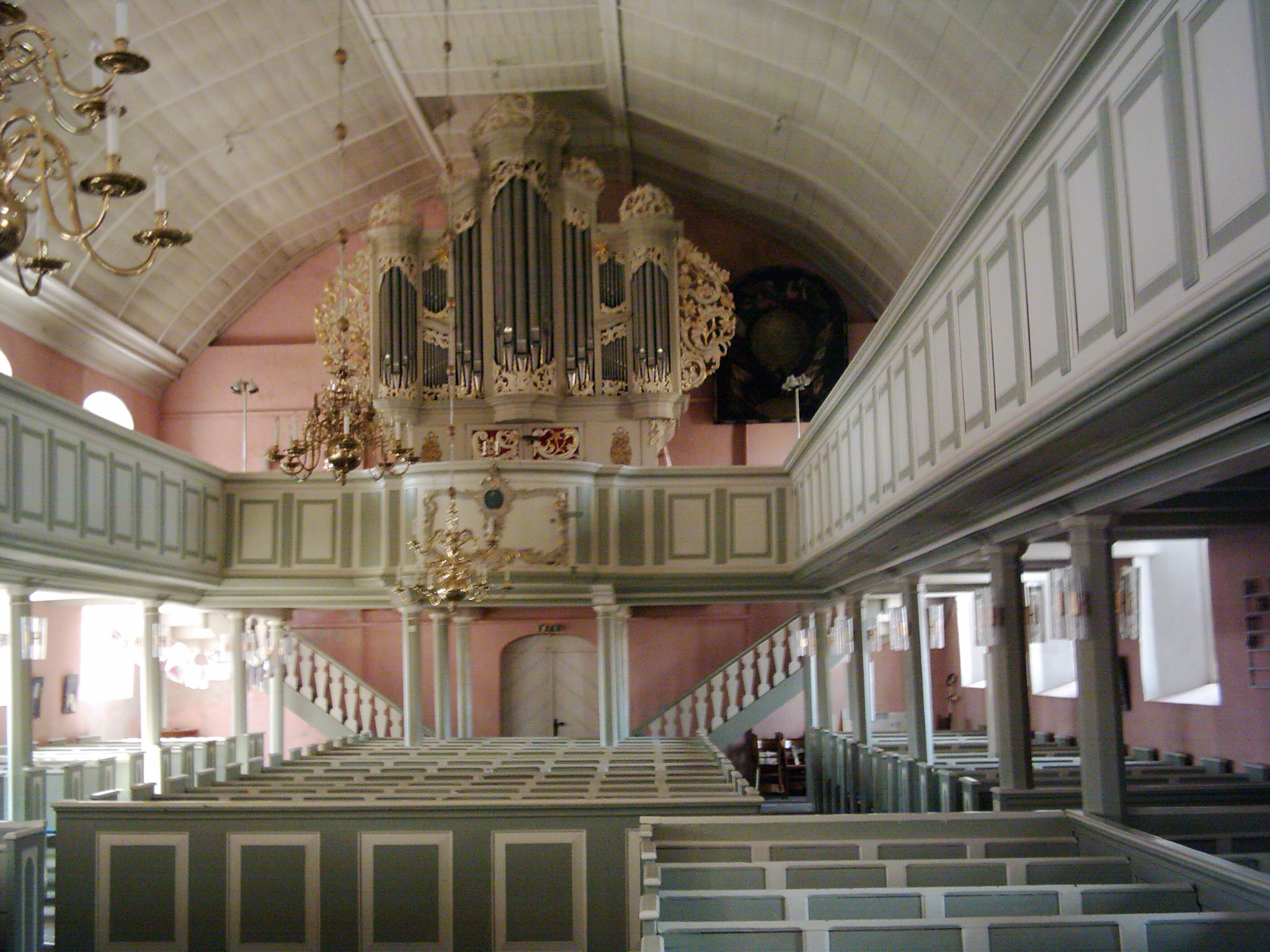 Blick nach Westen ST. Nikolai